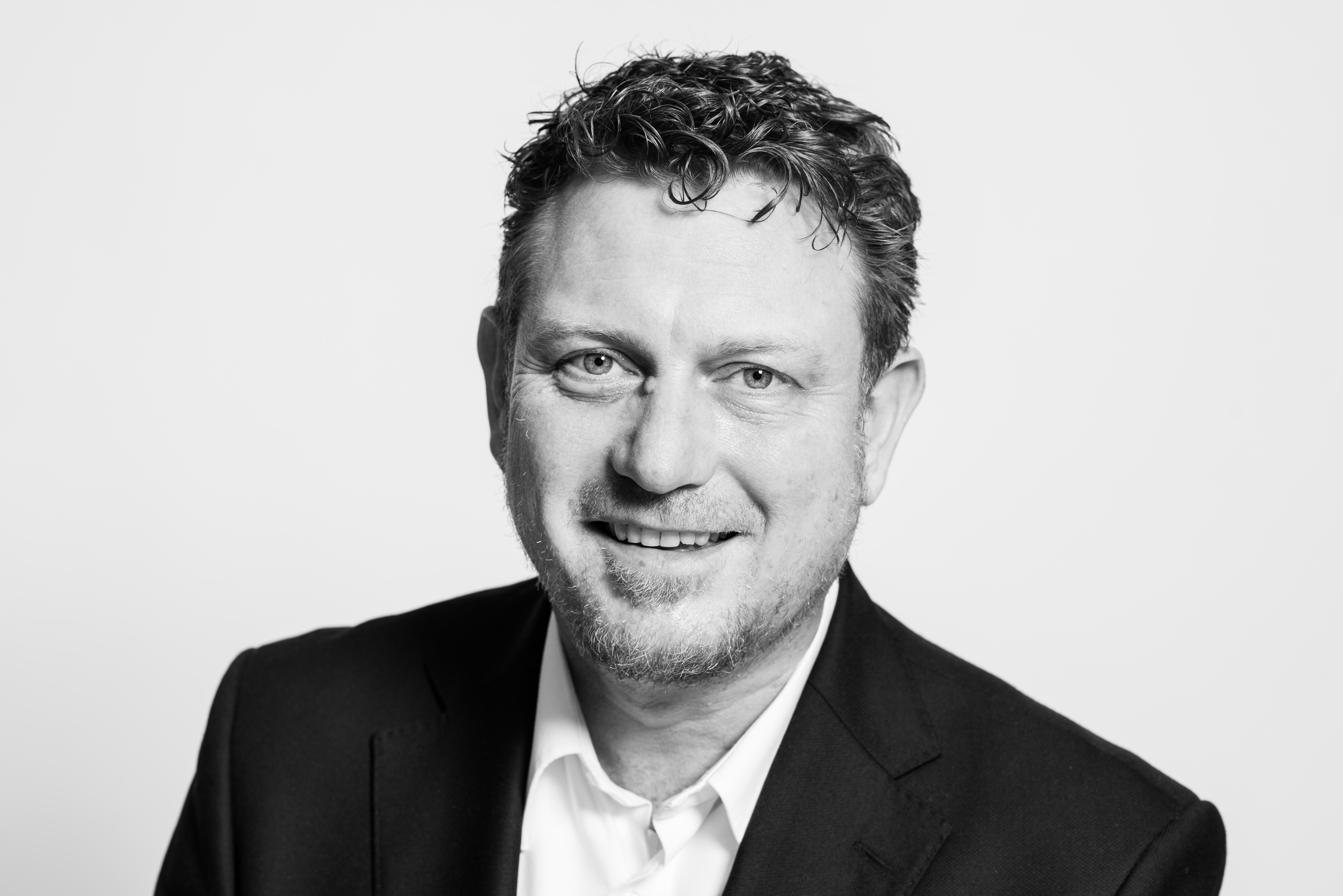 Jimmy Schulz, Bundestagsabgeordneter der Freien Demokraten aus Bayern.